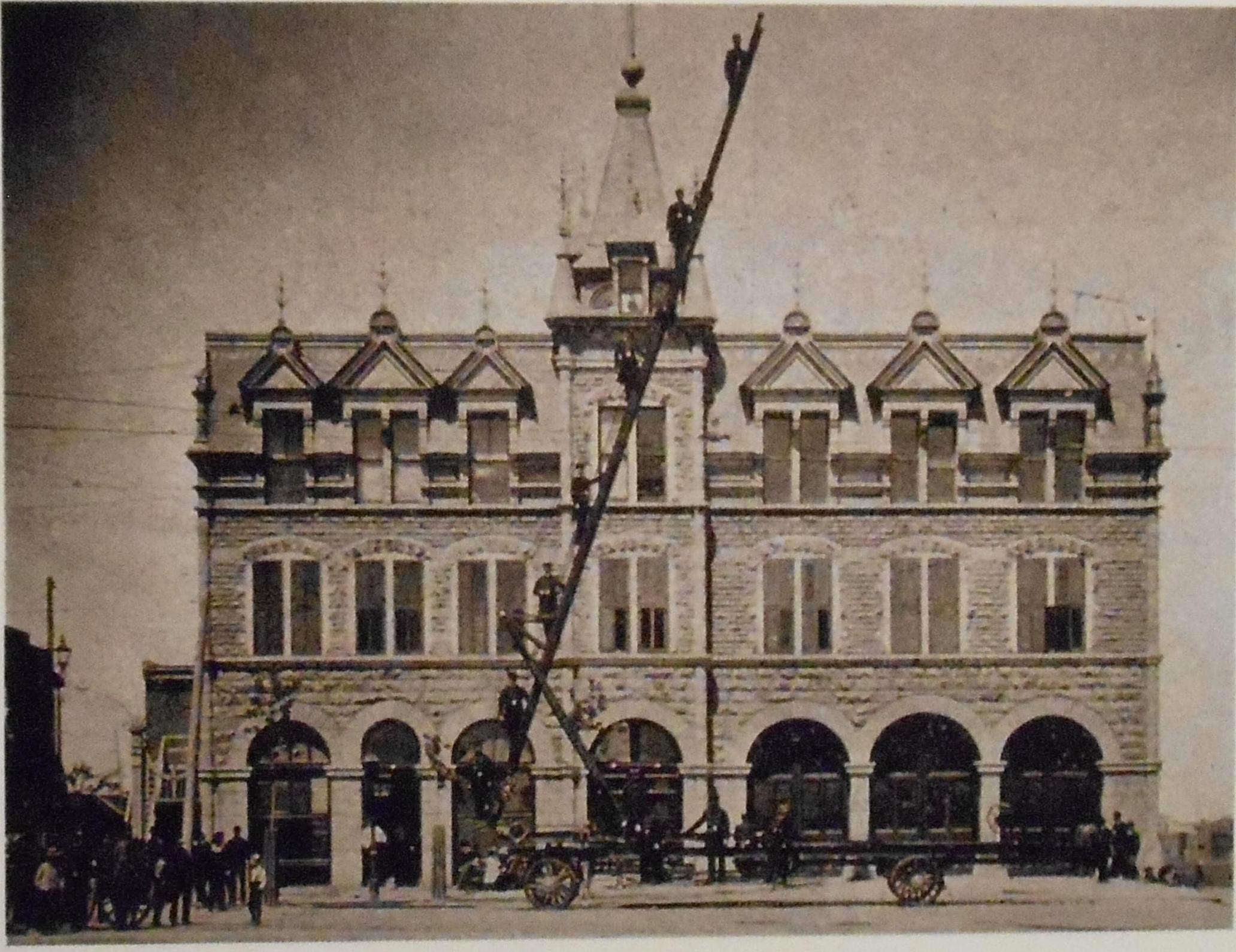 Échelle Collerette devant la caserne 16